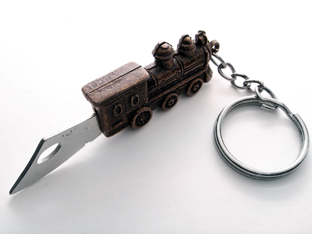 Navaja hecha de metal con forma de locomotora. Con la hoja cerrada, mide 4cm. aproximadamente. Puede ser usada como llavero.